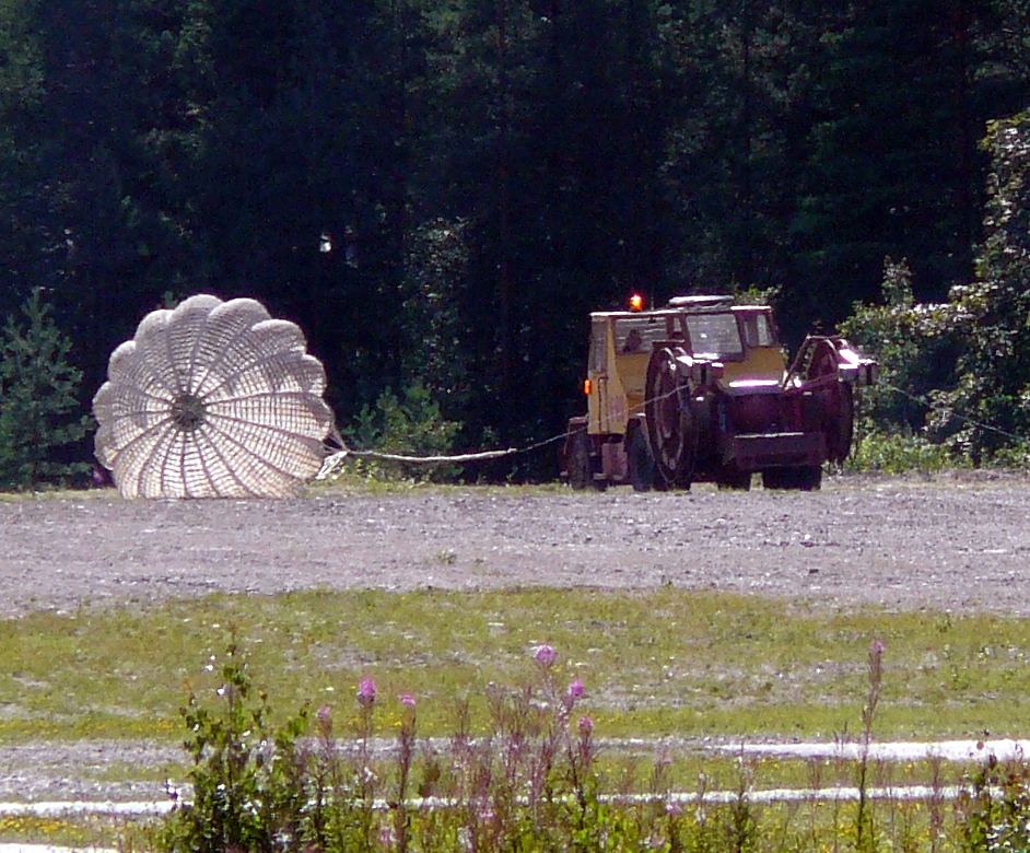 Hyik:n vintturi